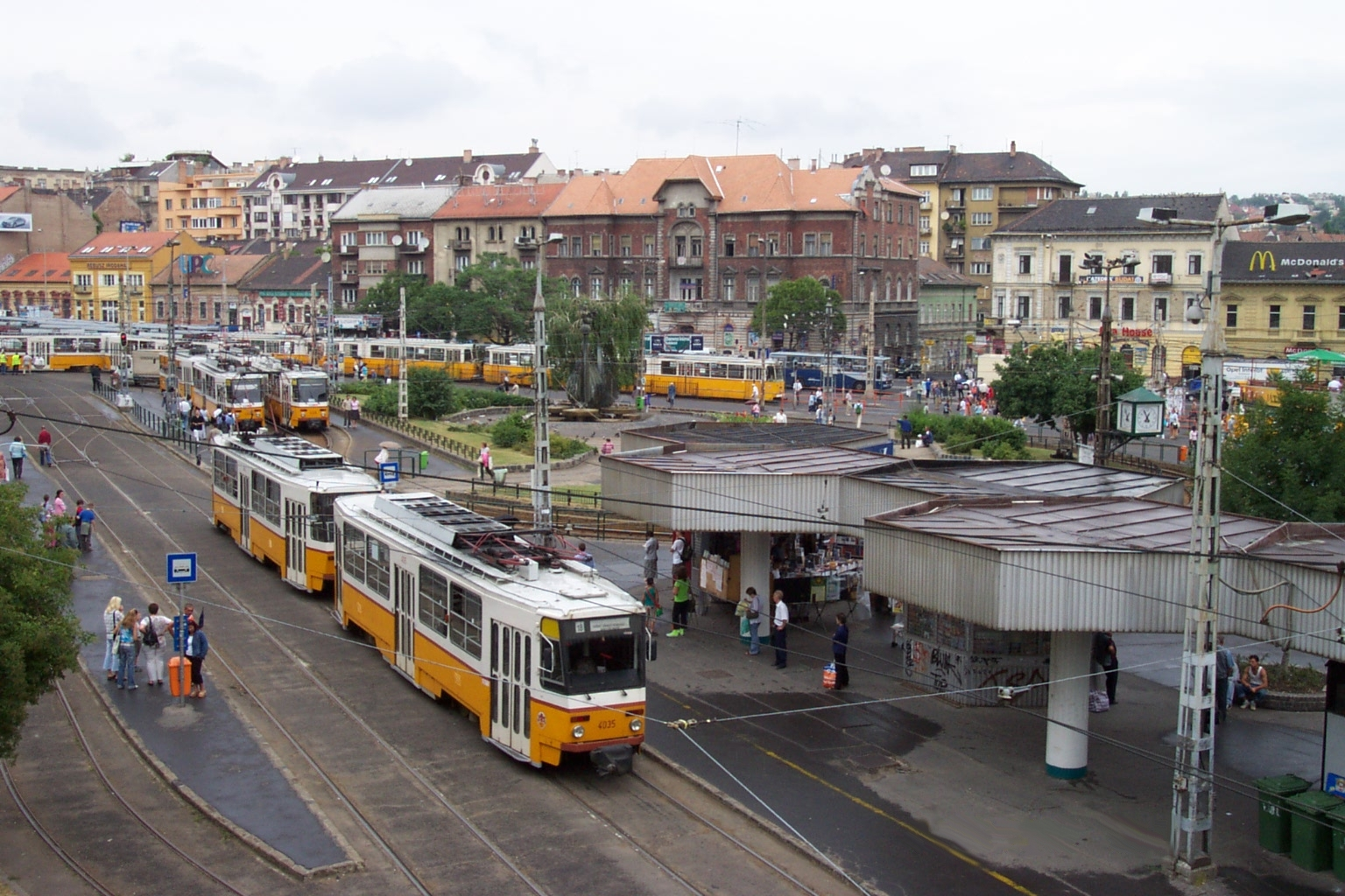 Stanice metra Moszkva Tér (na povrchu) a přilehlý tramvajový terminál